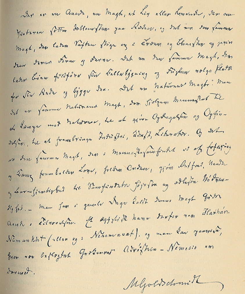 Meïr Aron Goldschmidts håndskrift.